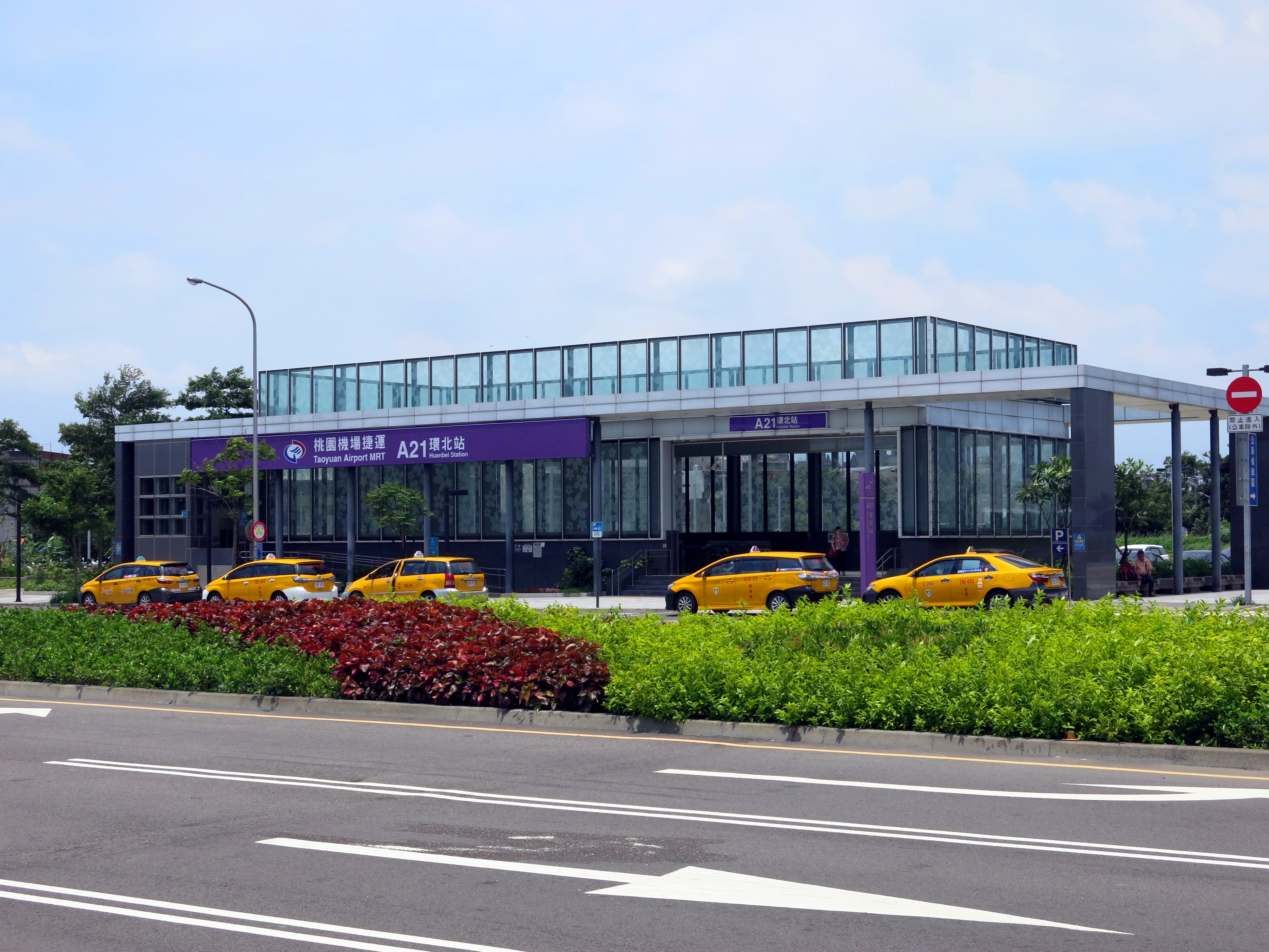 中文（台灣）: 桃園捷運機場線A21環北站